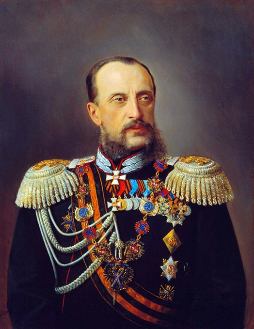 Великий князь Николай Николаевич Старший, портрет Николая Шильдера, конец 19 в.